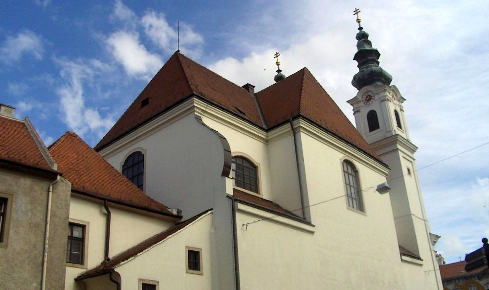 R. k. templom, Domonkos templom (Sopron, Széchenyi István tér 3-4. Mátyás király utca 2.)